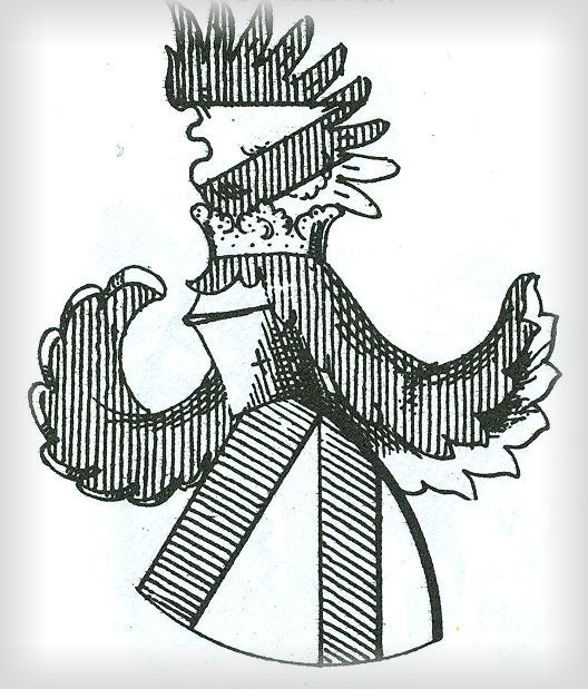 Wappen der Wispecks aus Johann Siebmachers Wappen-Buch, Bd. 28